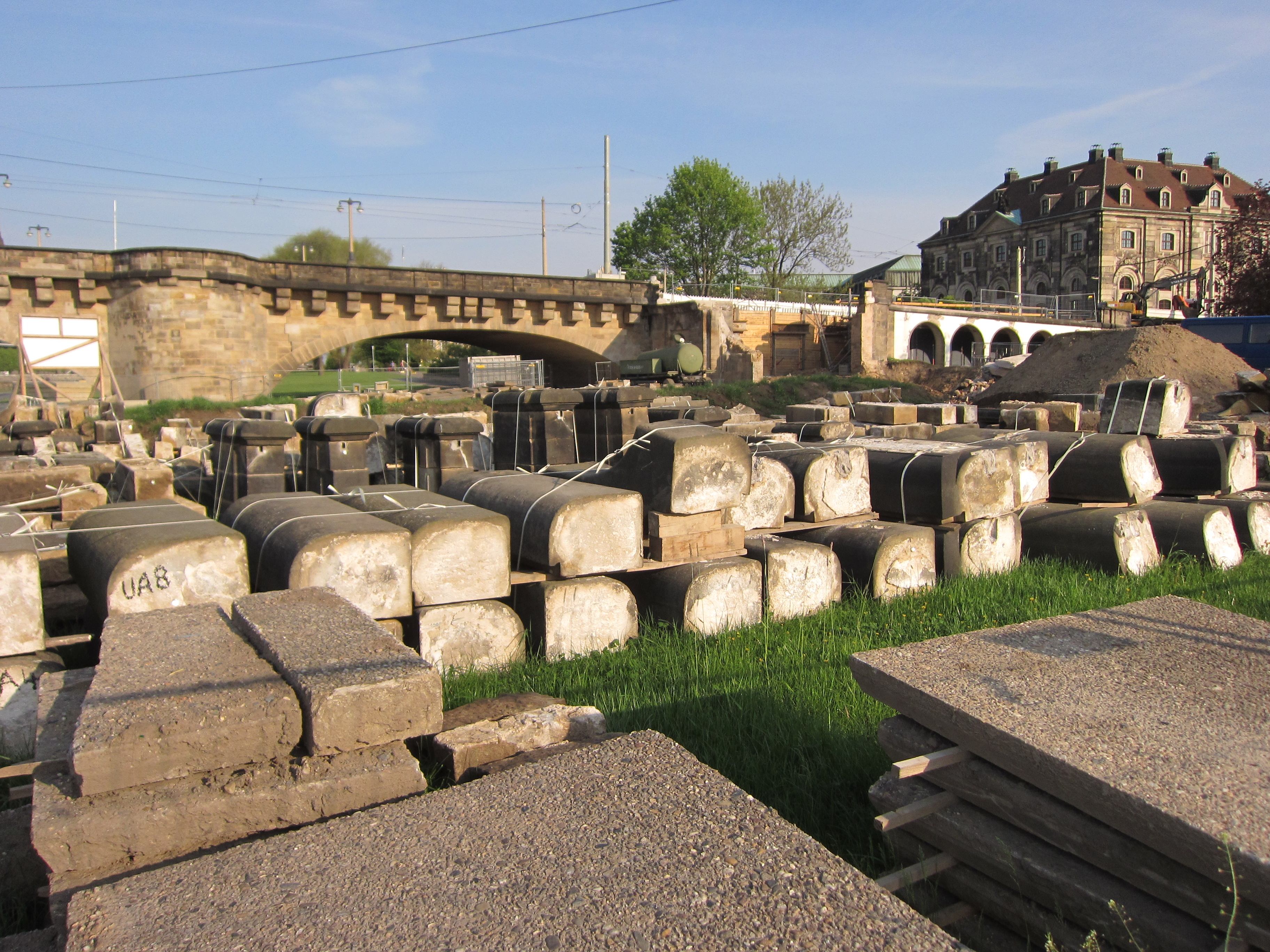 Bauarbeiten am nord-östlichen Treppenaufgang der Augustusbrücke